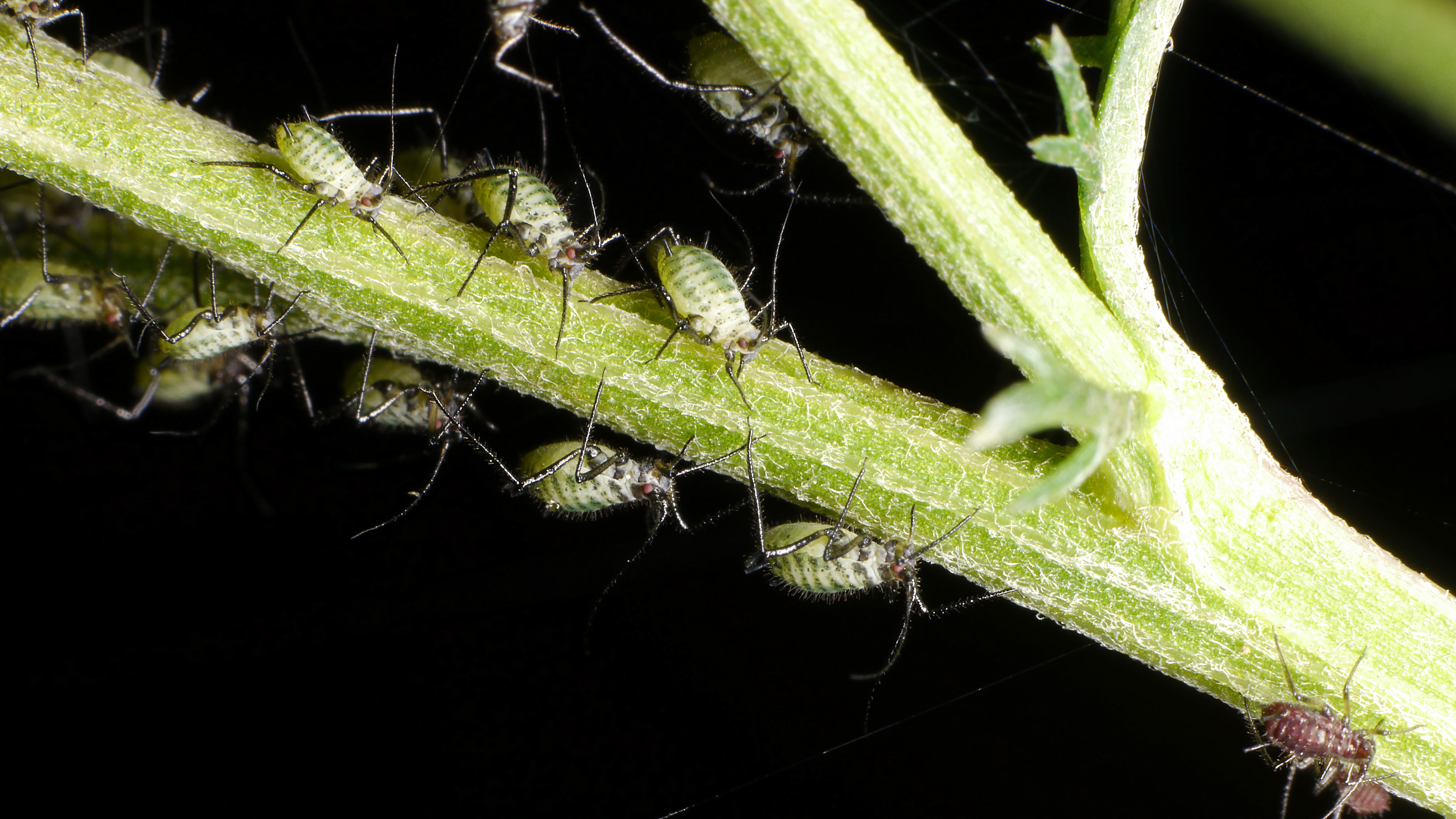 Blattläuse - Aphidoidea. Aufgenommen in Mannheim-Vogelstang, Baden-Württemberg, Deutschland.